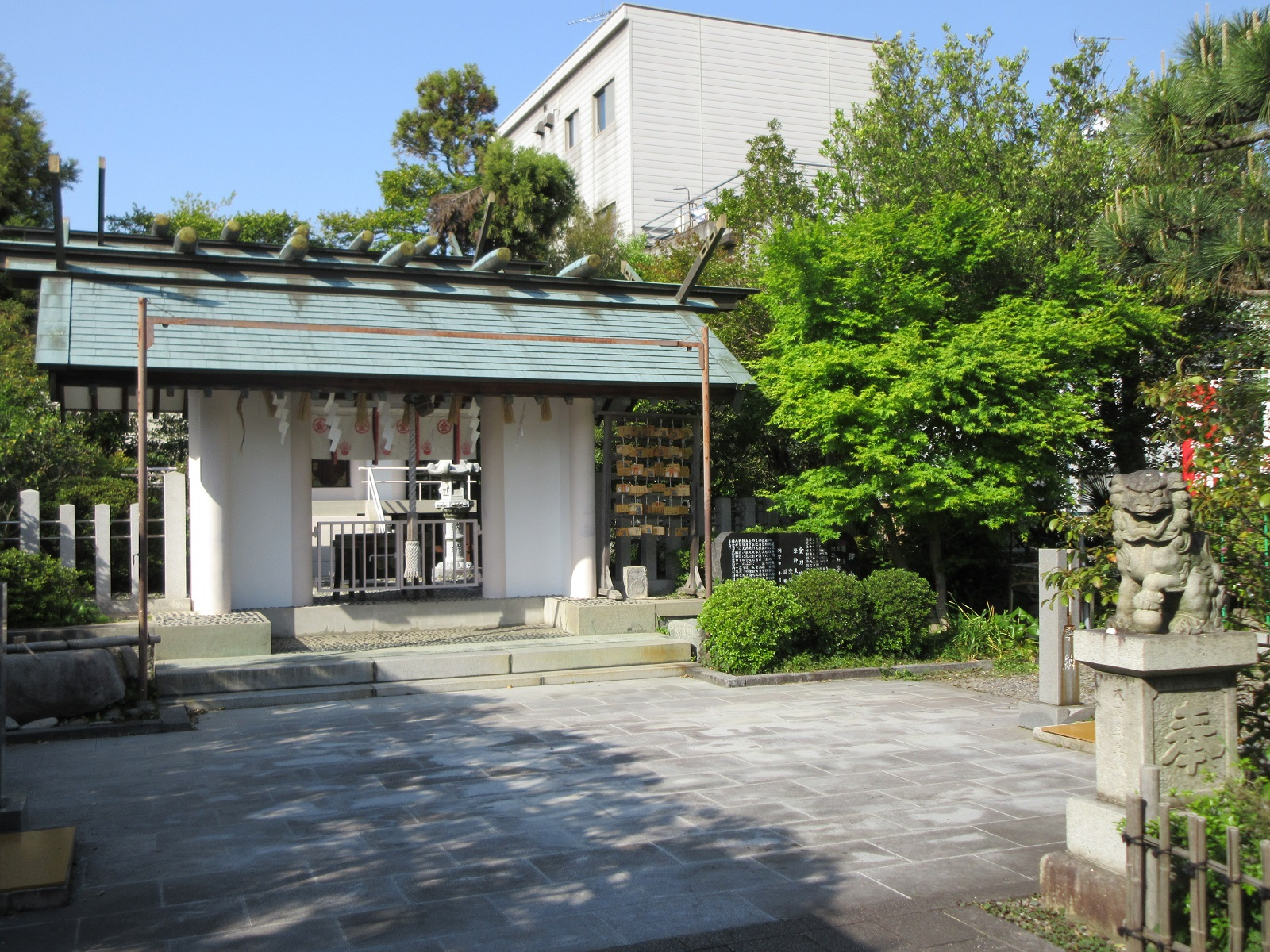 徳王稲荷社金刀比羅社（岡崎市西中町）